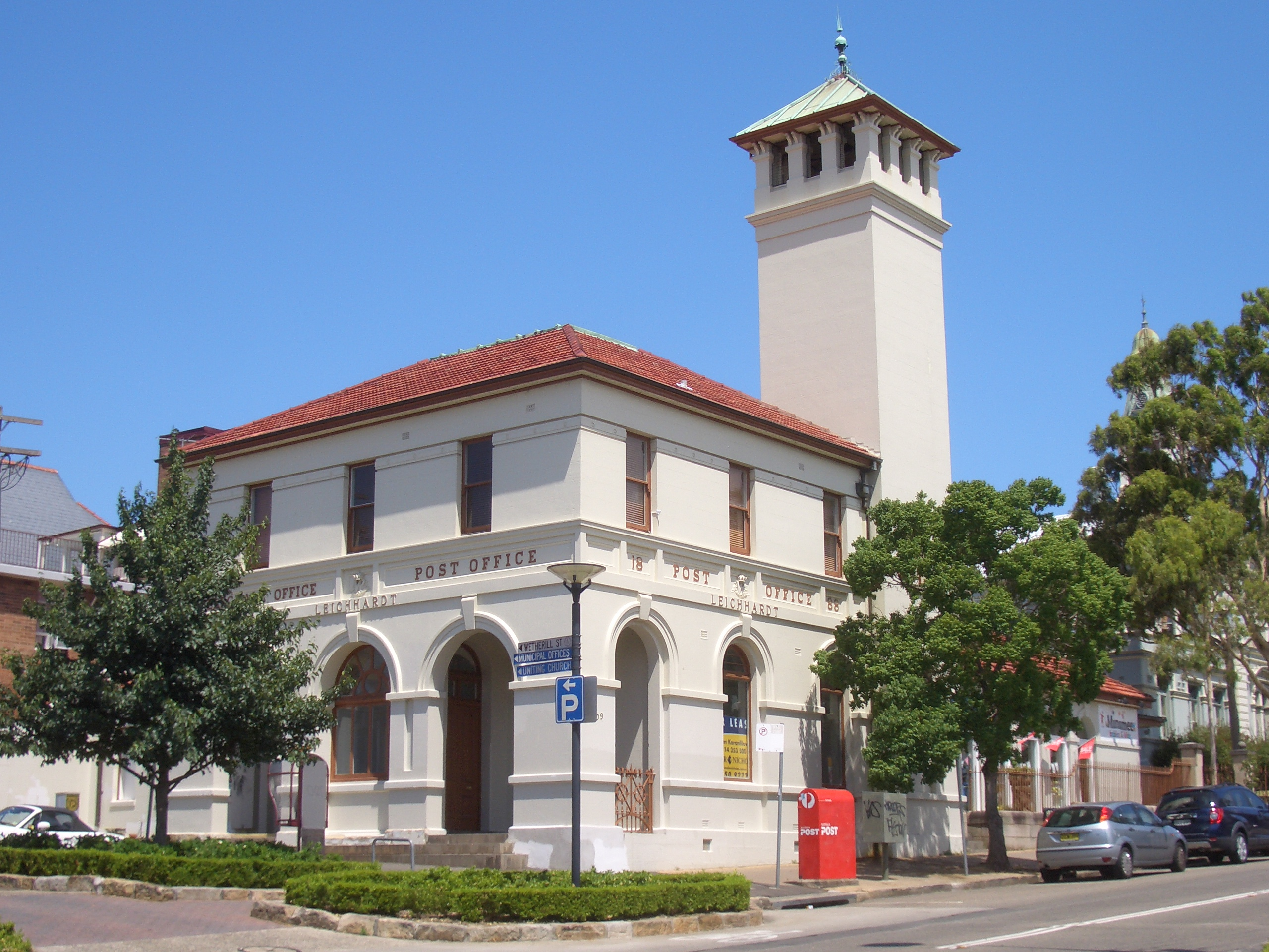 Leichhardt Post Office, Norton Street